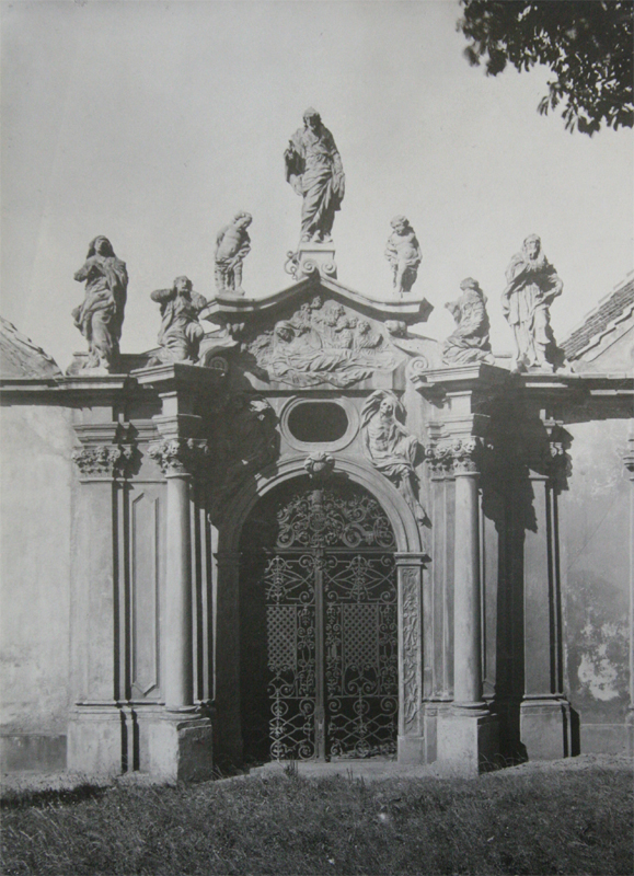 Grufthaus Nr. 15 (Fam. Gottfried/Hess) auf dem Gnadenkirchhof in Jelenia Góra (Hirschberg); vollendet um 1738.